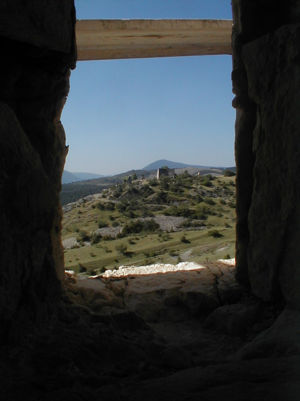 Peyroules les ruines de l'ancien village